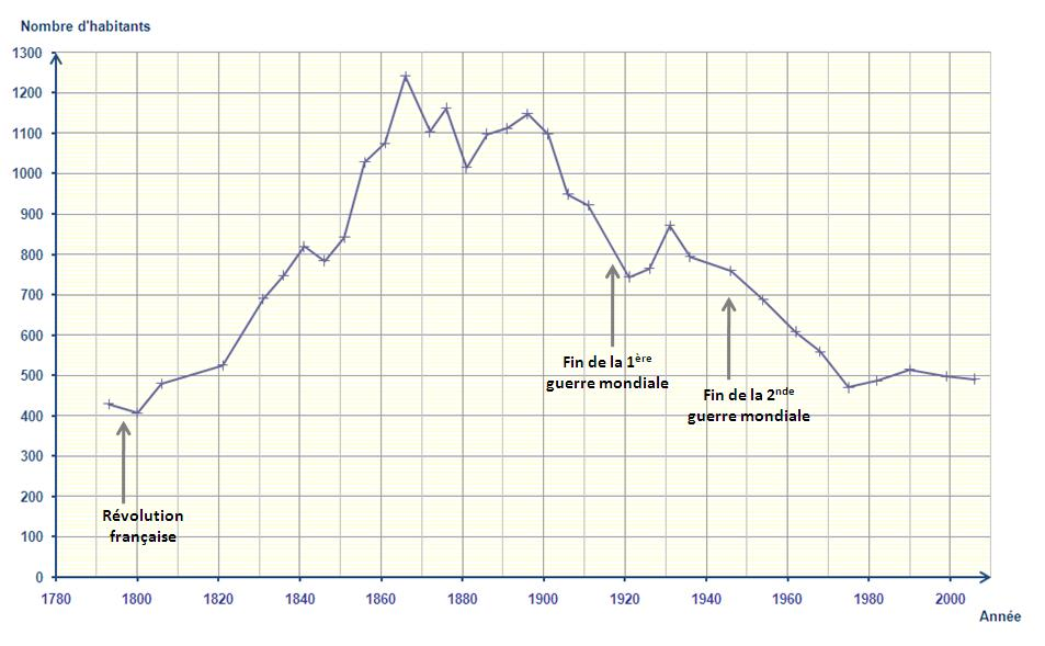 Population du village de Lalouvesc (1792-2010).